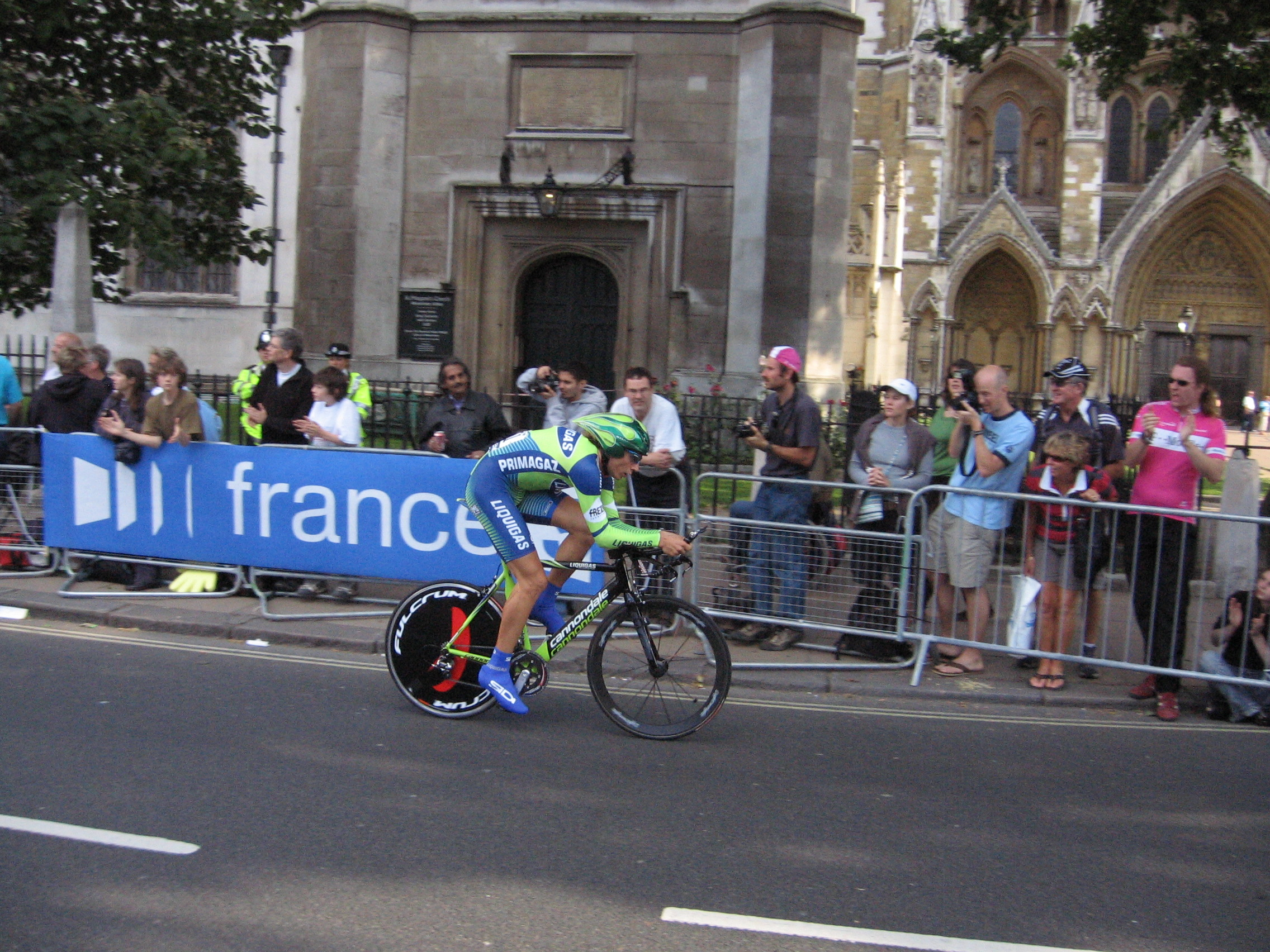 The Italian cyclist Filippo Pozzato